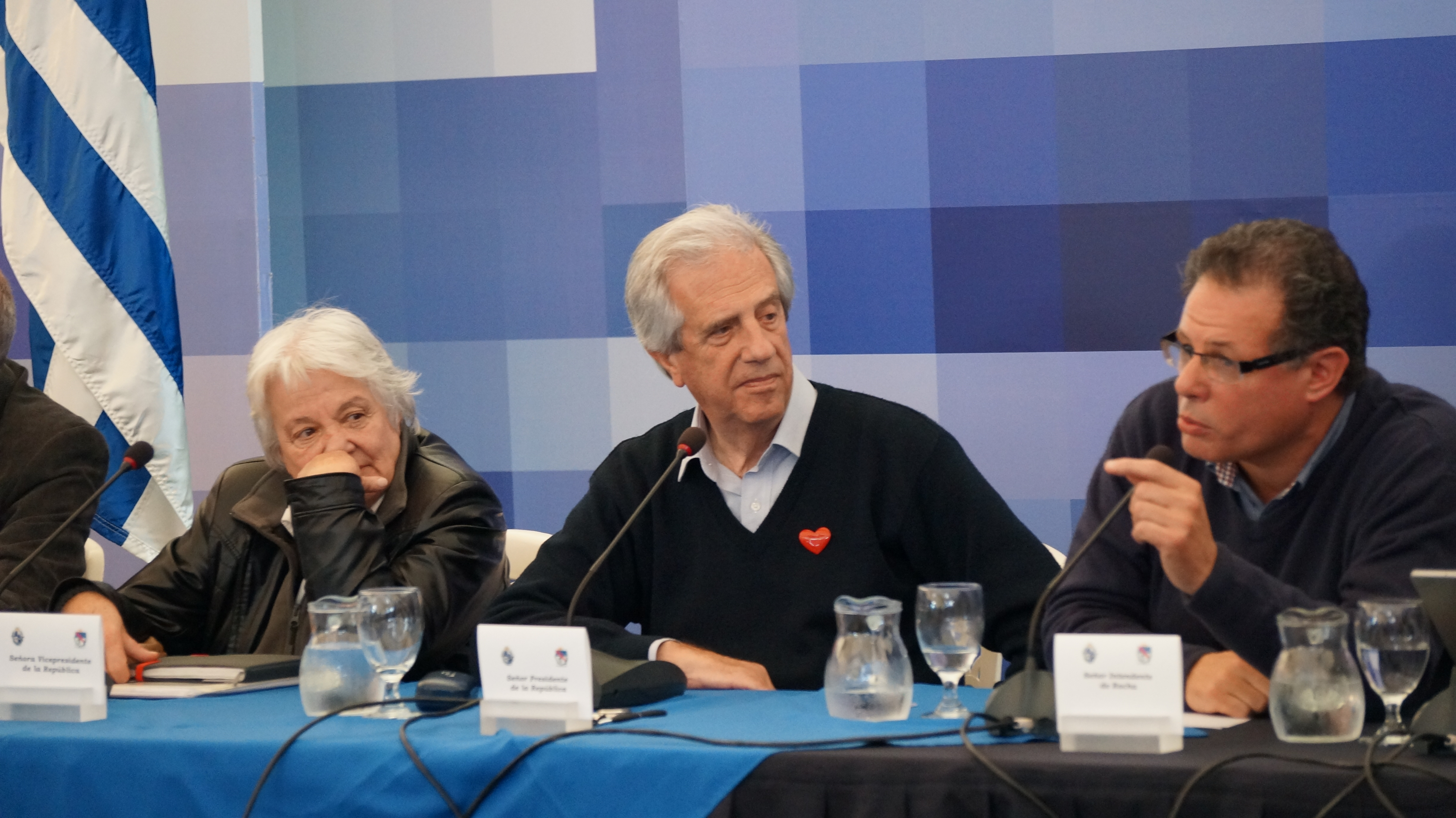 Intendente Aníbal Pereyra recibe a Presidente y Vice de la República en Consejo de Ministros realizado en 19 de Abril (Rocha) el 26 de setiembre de 2017